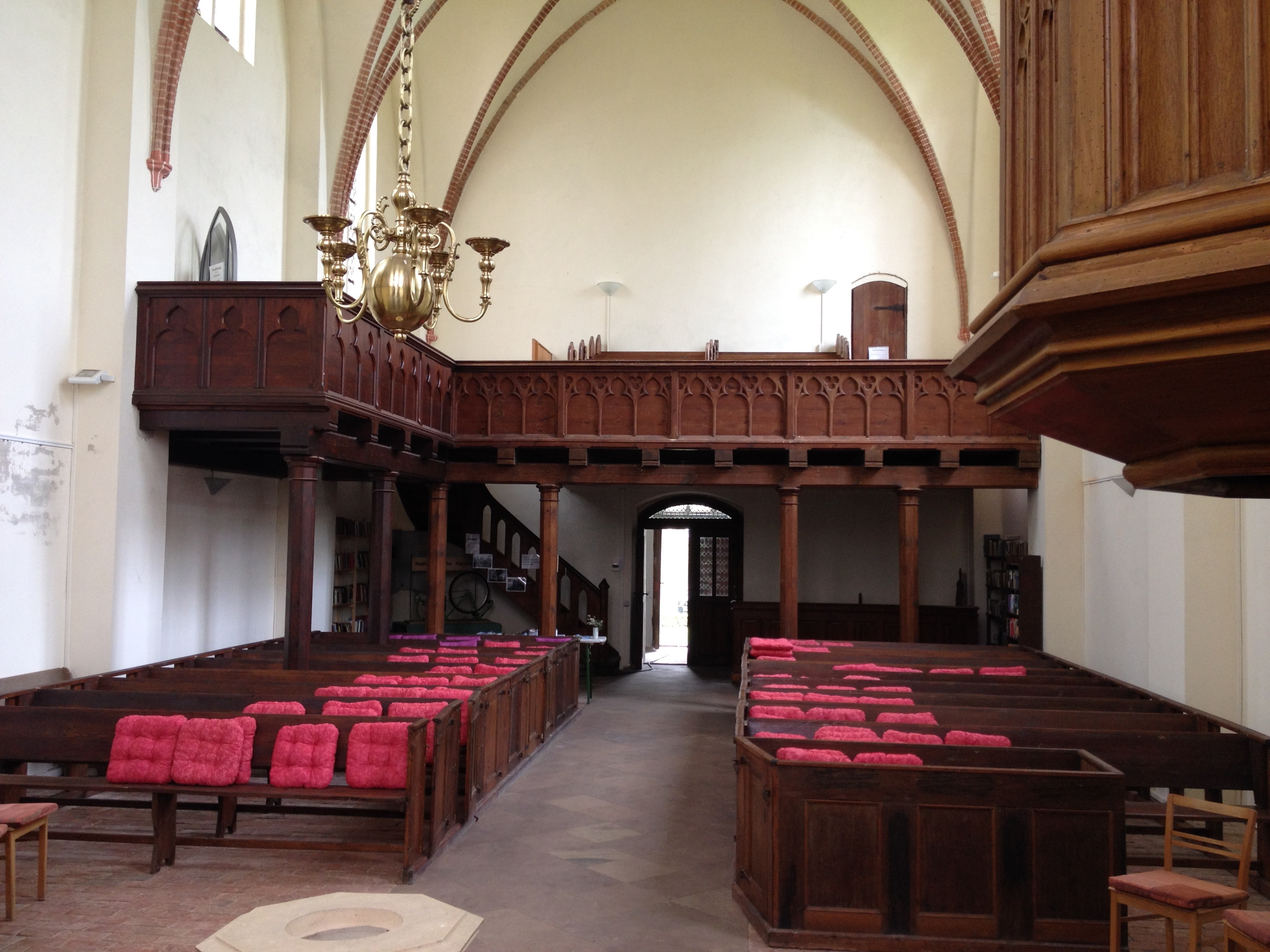 Die Empore der Dorfkirche Pantlitz.